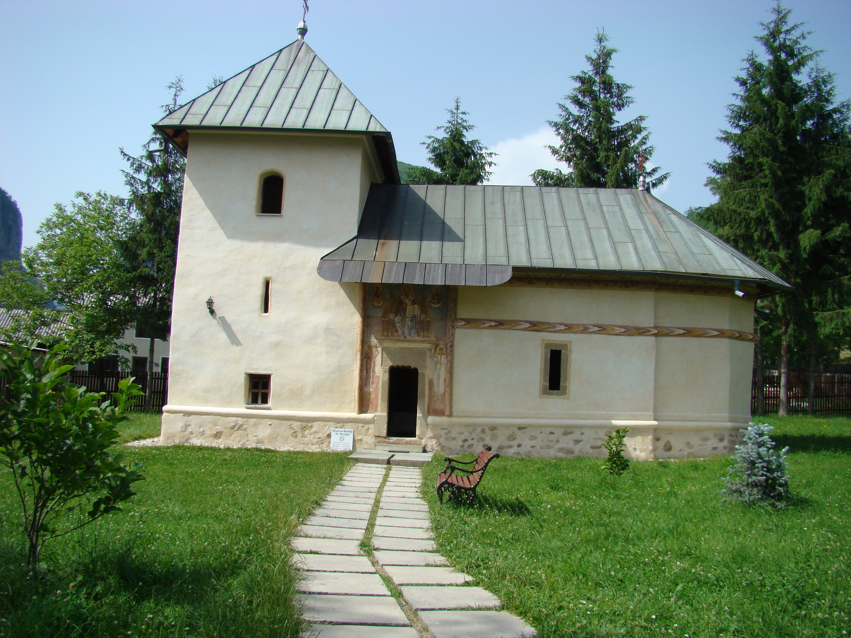 Bolnița Sf.Nicolae, Mănăstirea Polovragi, județul Gorj 02